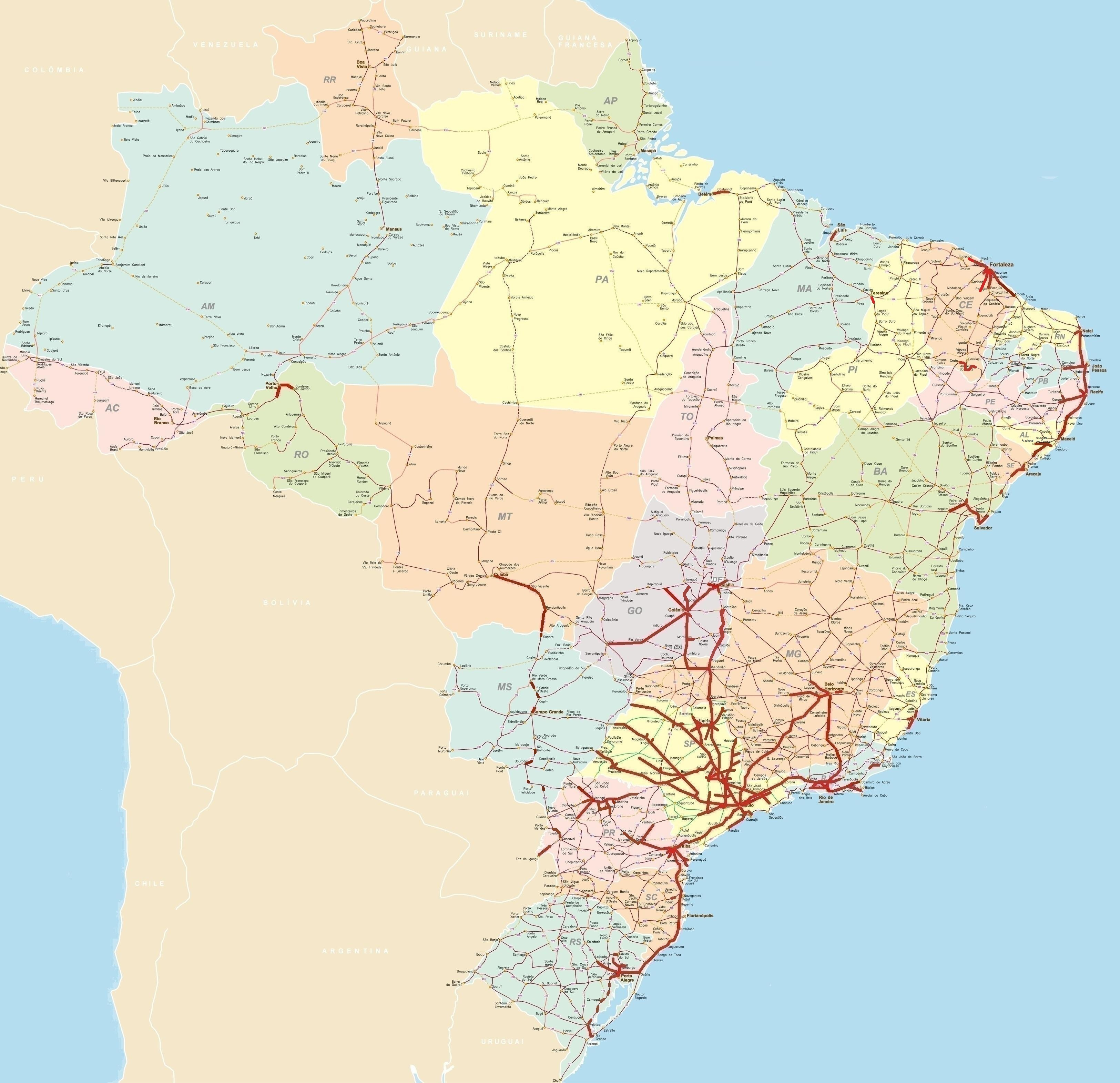 Rodovias Duplicadas do Brasil, Junho de 2019